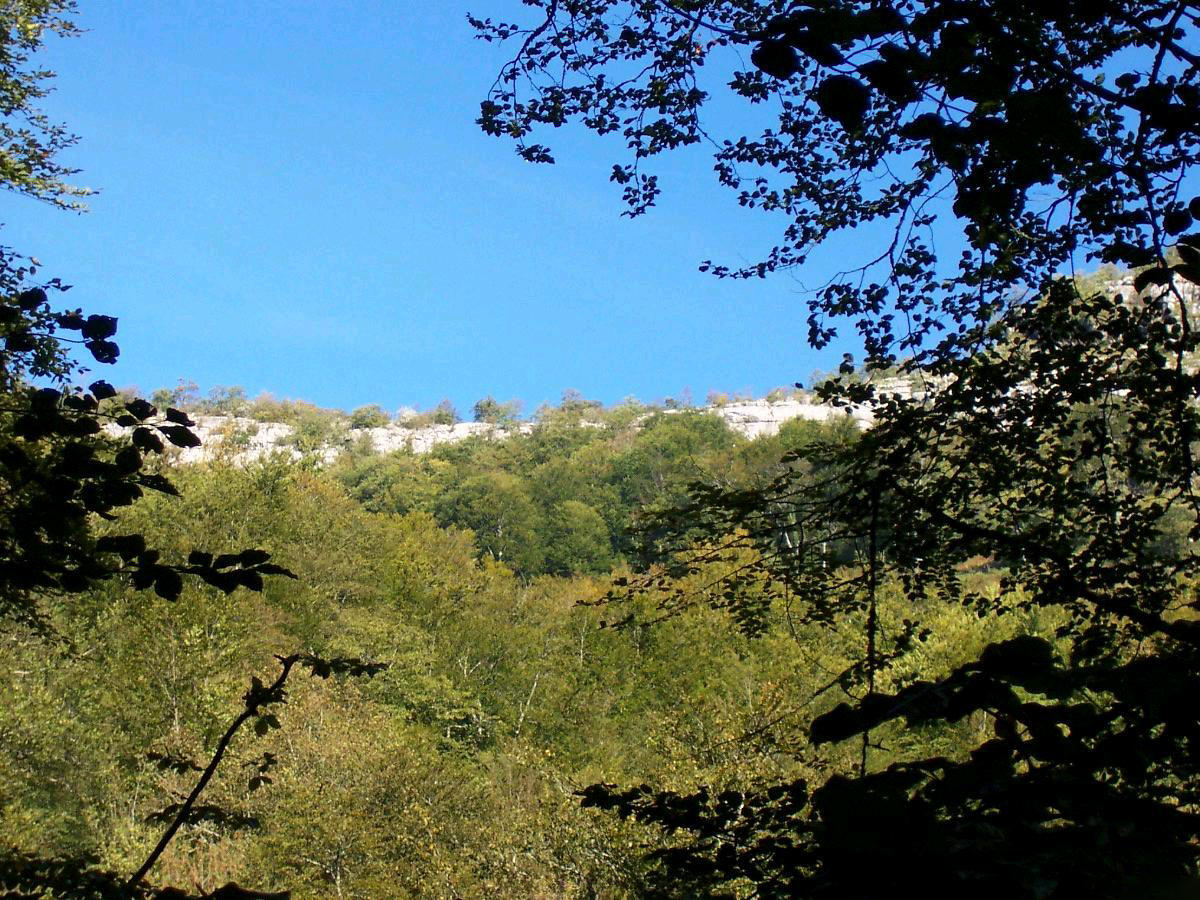 Vue depuis le chemin de bohocortia dans la forêt des arbailles